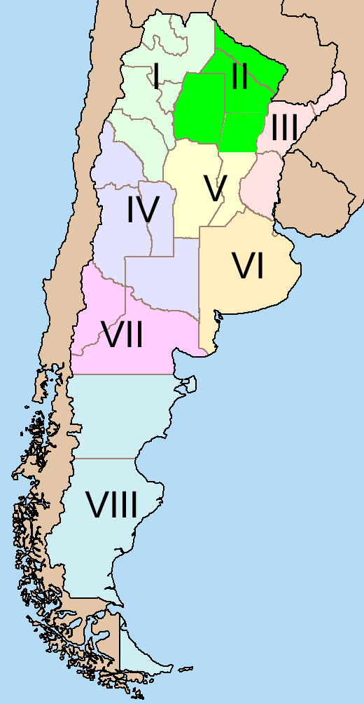 Áreas en las que se divide la República Argentina para la numeración de rutas nacionales regionales